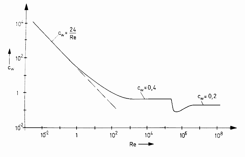 Widerstandsbeiwert cW einer Kugel in strömender Luft als Funktion der Reynoldszahl Re.